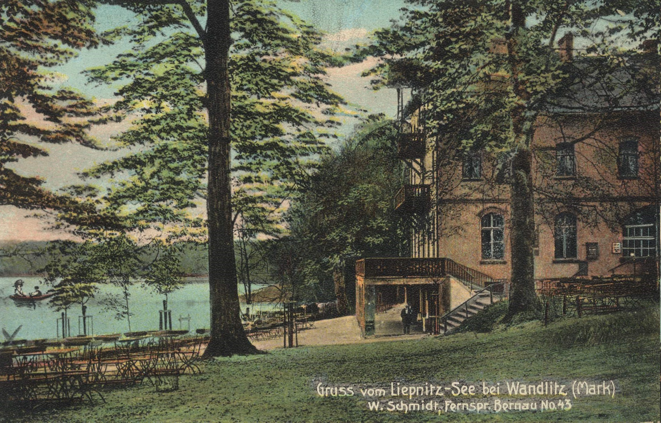 Gasthaus von Wilhelm Schmidt am Liepnitzsee